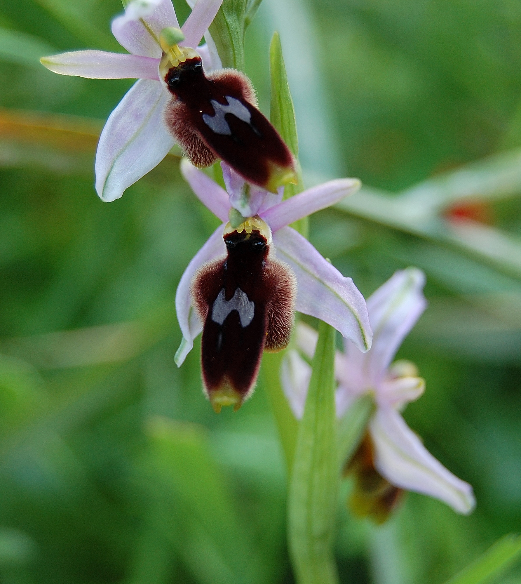 Orchidee dello Zingaro Ophrys lunulata